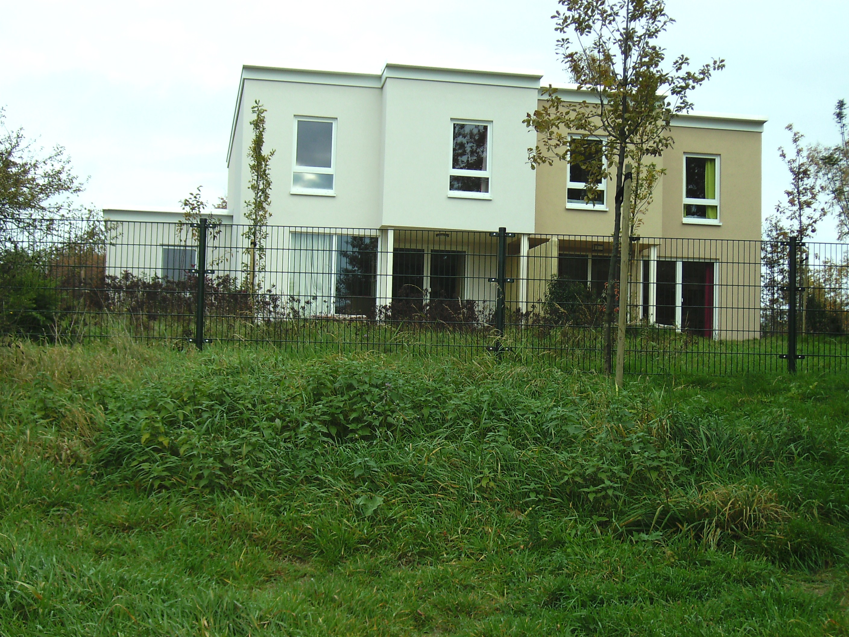 Bostalsee: Musterhaus für den geplanten Ferienpark